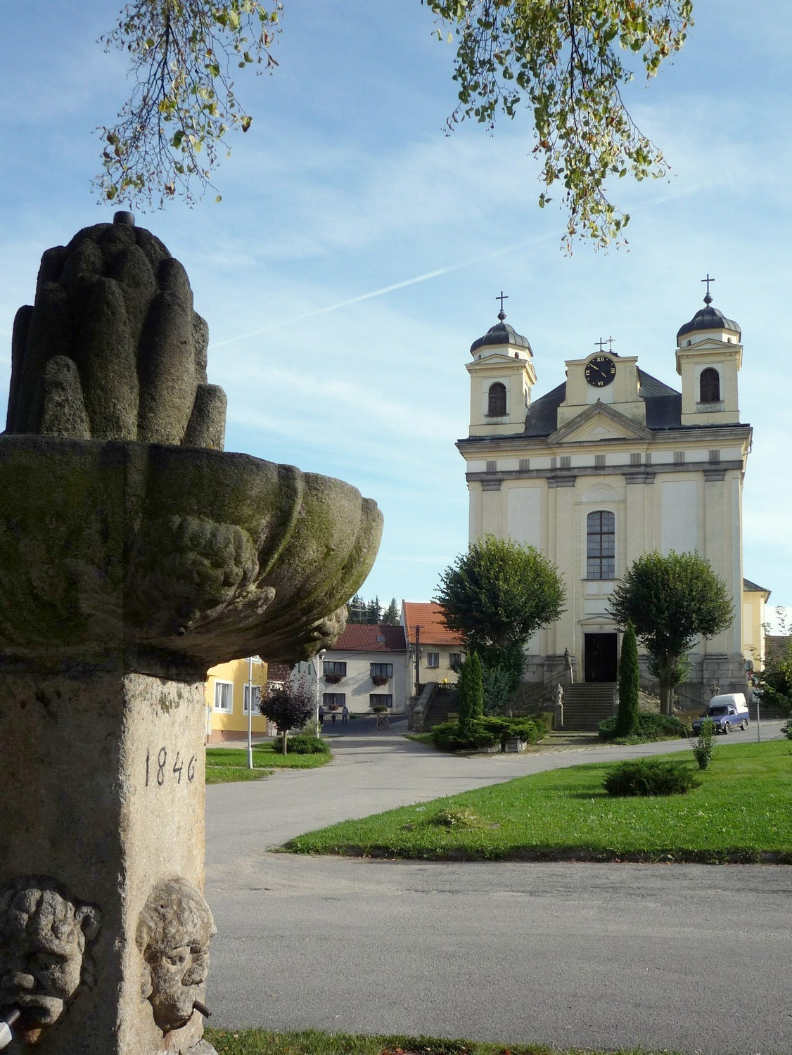 Barokní kostel sv. Petra a Pavla s klasicistně upraveným průčelím v Batelově (v popředí část kašny).